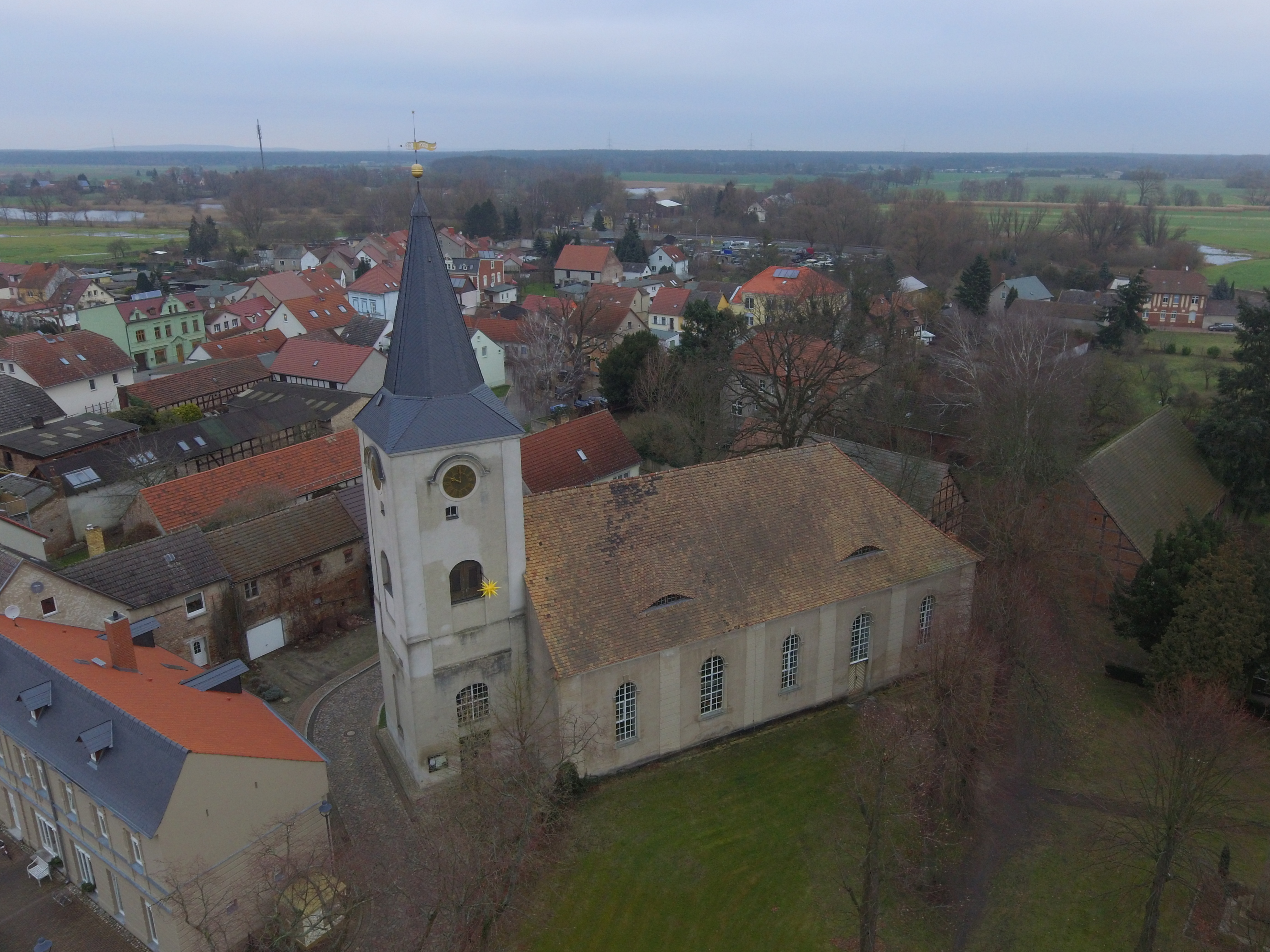 Luftbild Kirche Pritzerbe